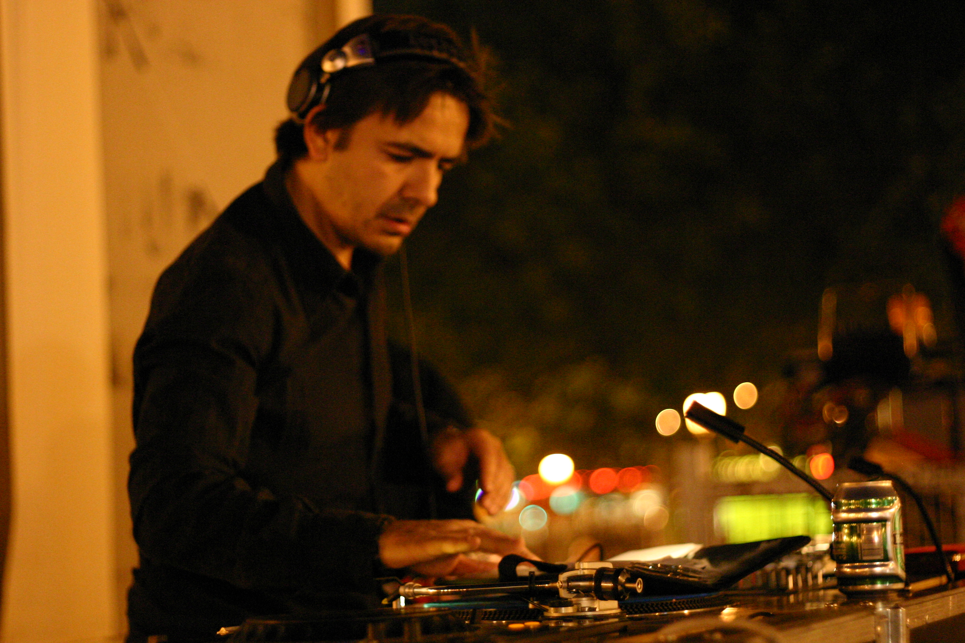 Laurent Garnier, lors de la fête célébrant la libération de Florence Aubenas, Place de la République, à Paris, le soir du 12 juin 2005